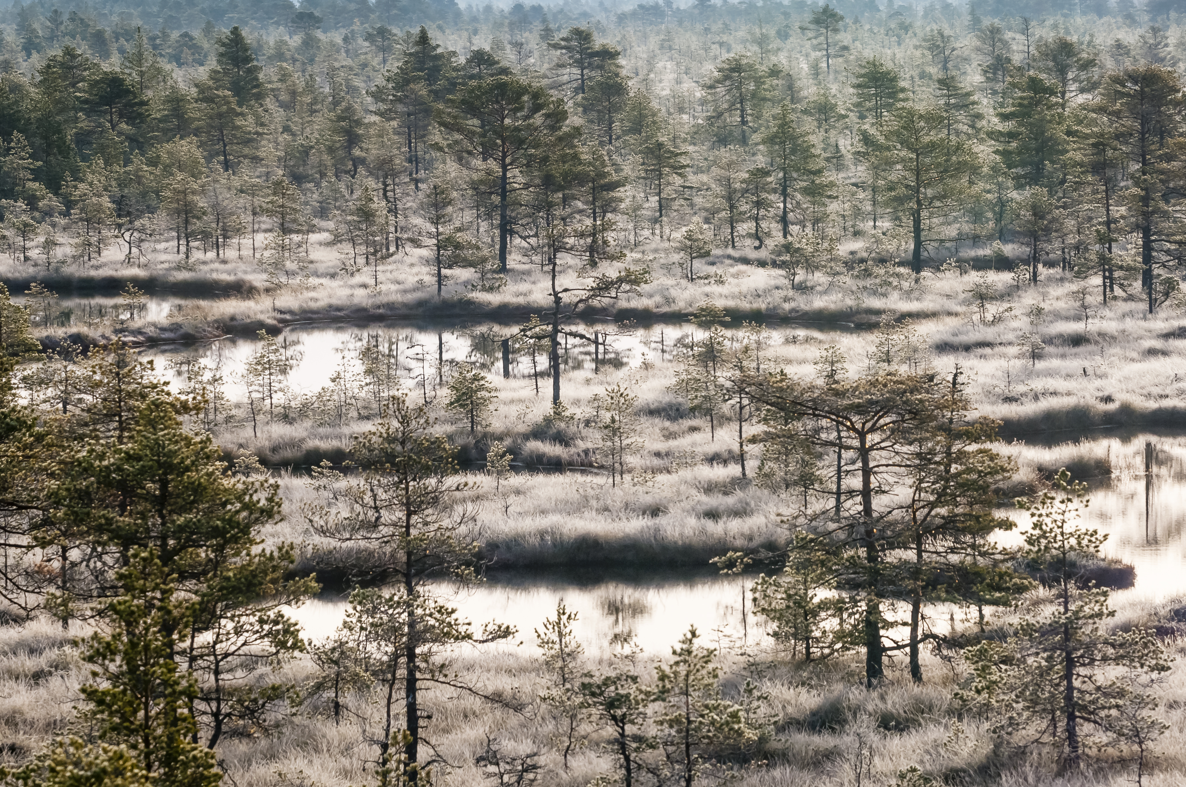 Kõnnu Suursoo. Põhja-Kõrvemaa LKA.